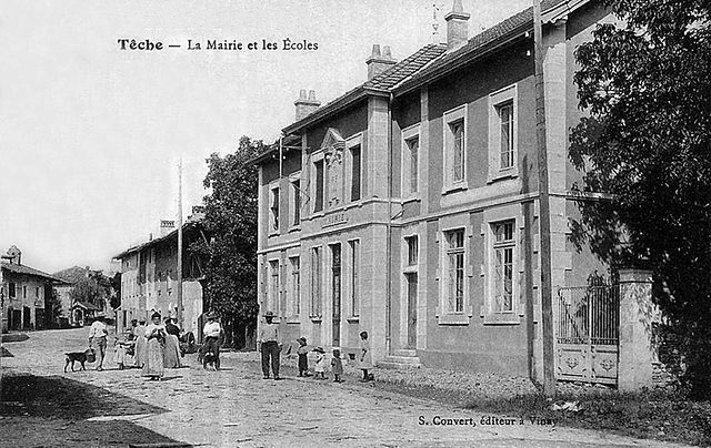 Têche, département de l'Isère, région Rhône-Alpes, France. Carte postale ancienne.